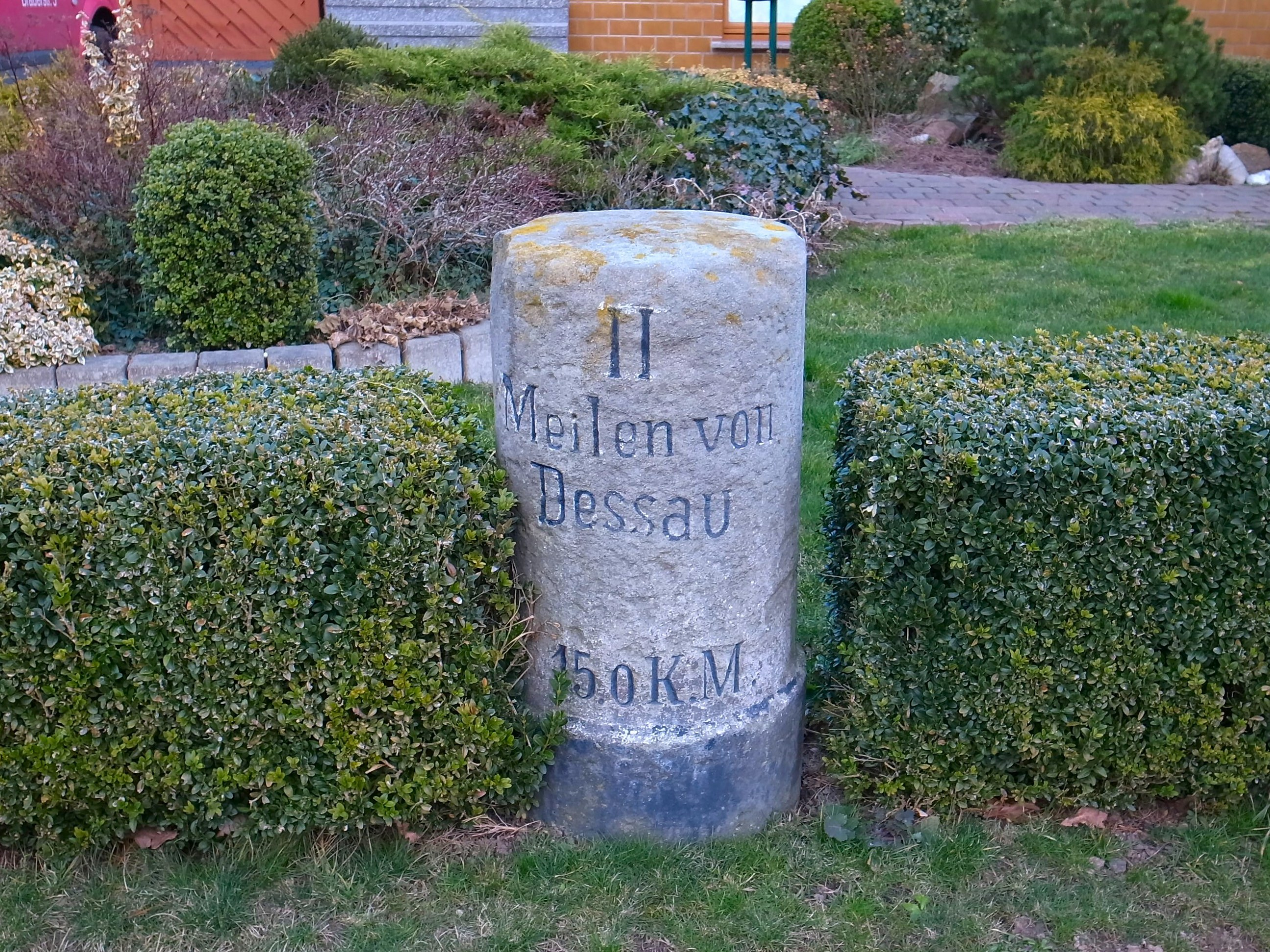 Kakau, Meilenstein: II Meilen von Dessau 15,0 km